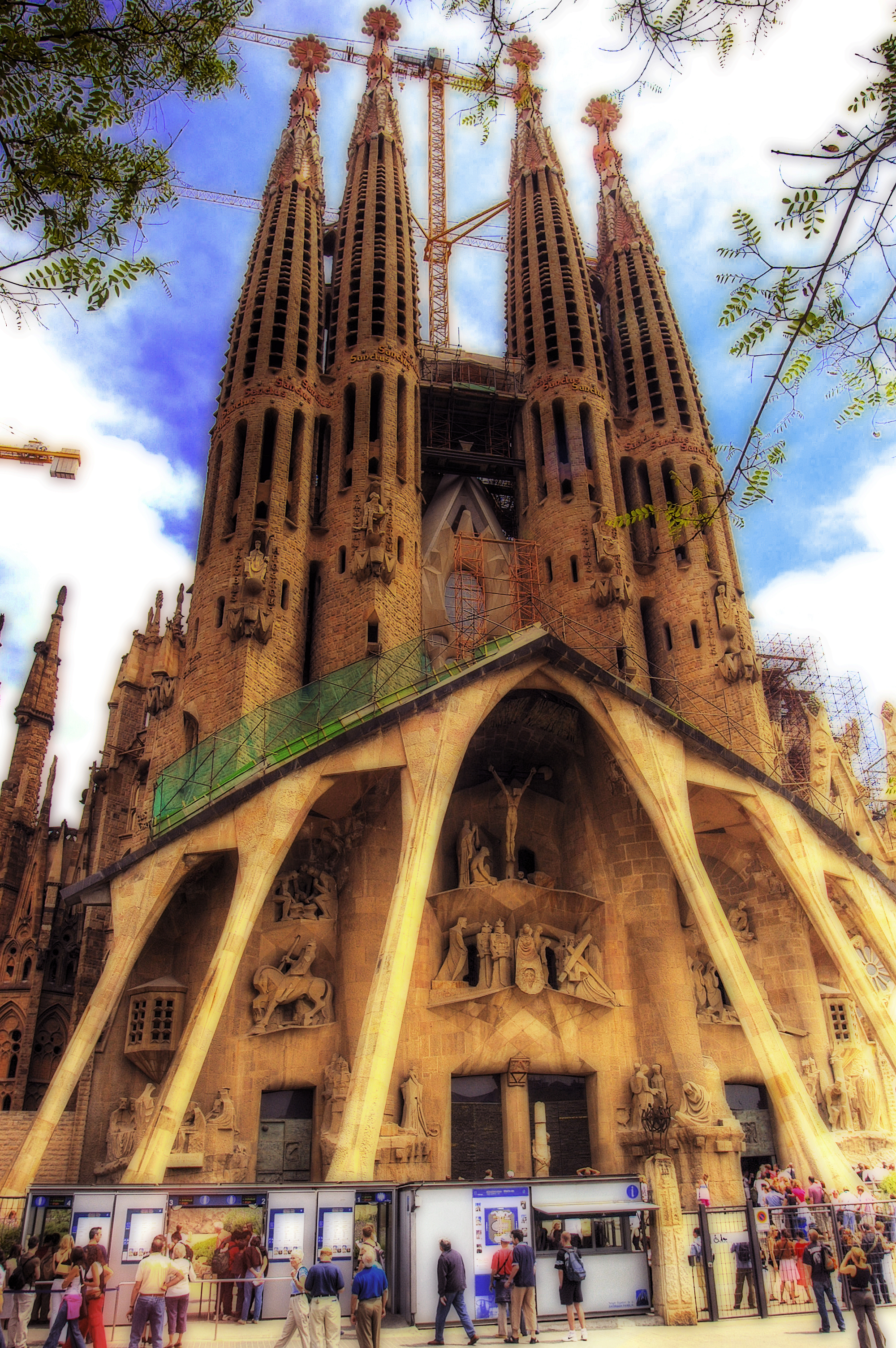 Sagrada Família, Barcelona